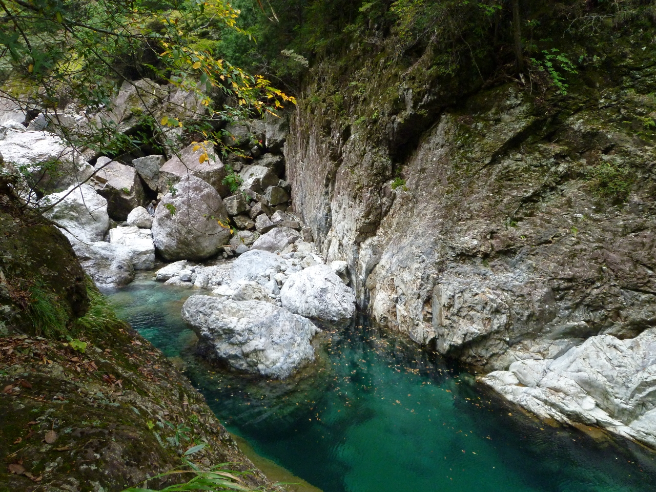 大杉谷の中流域。